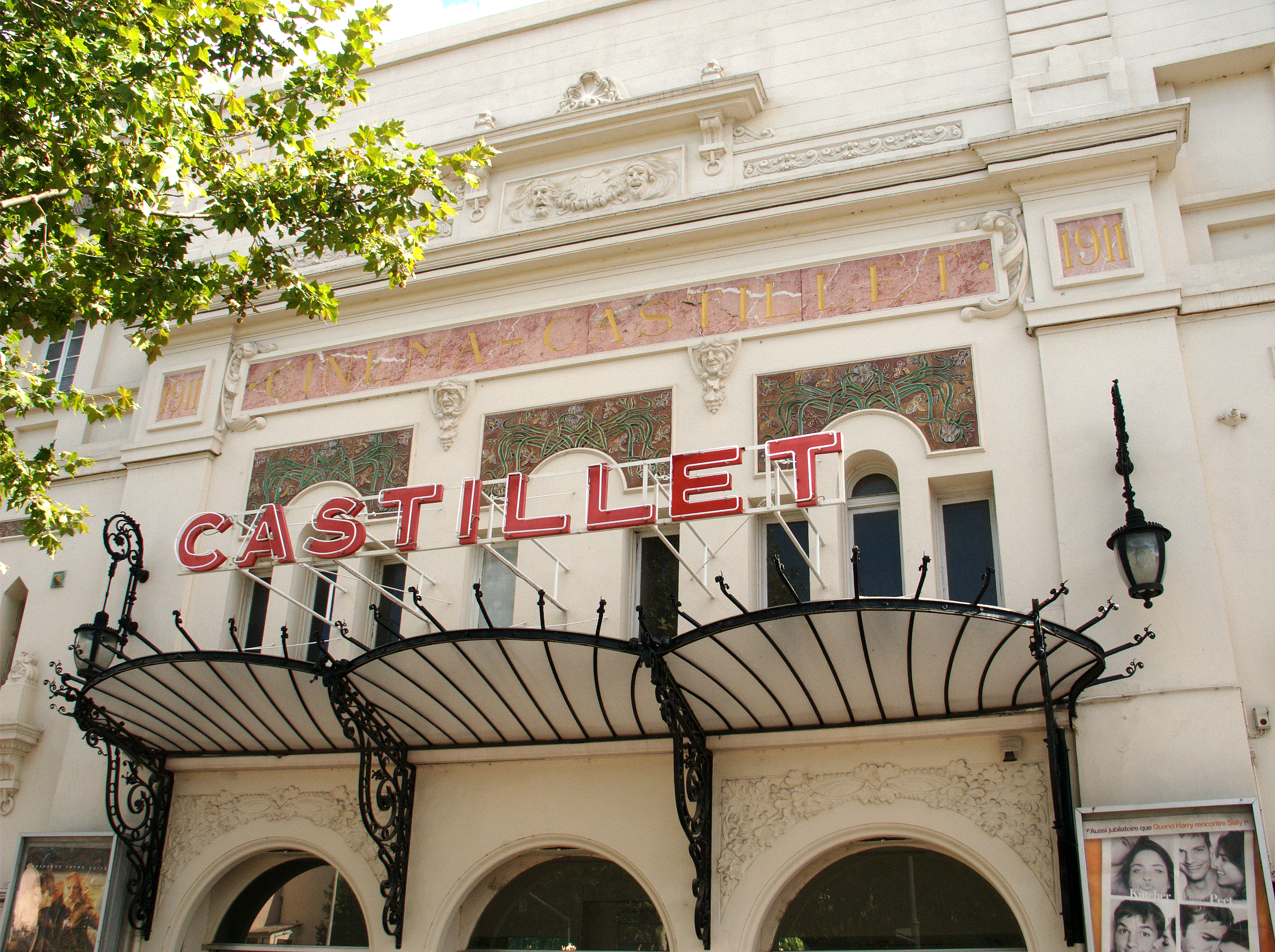 Cinema Castillet